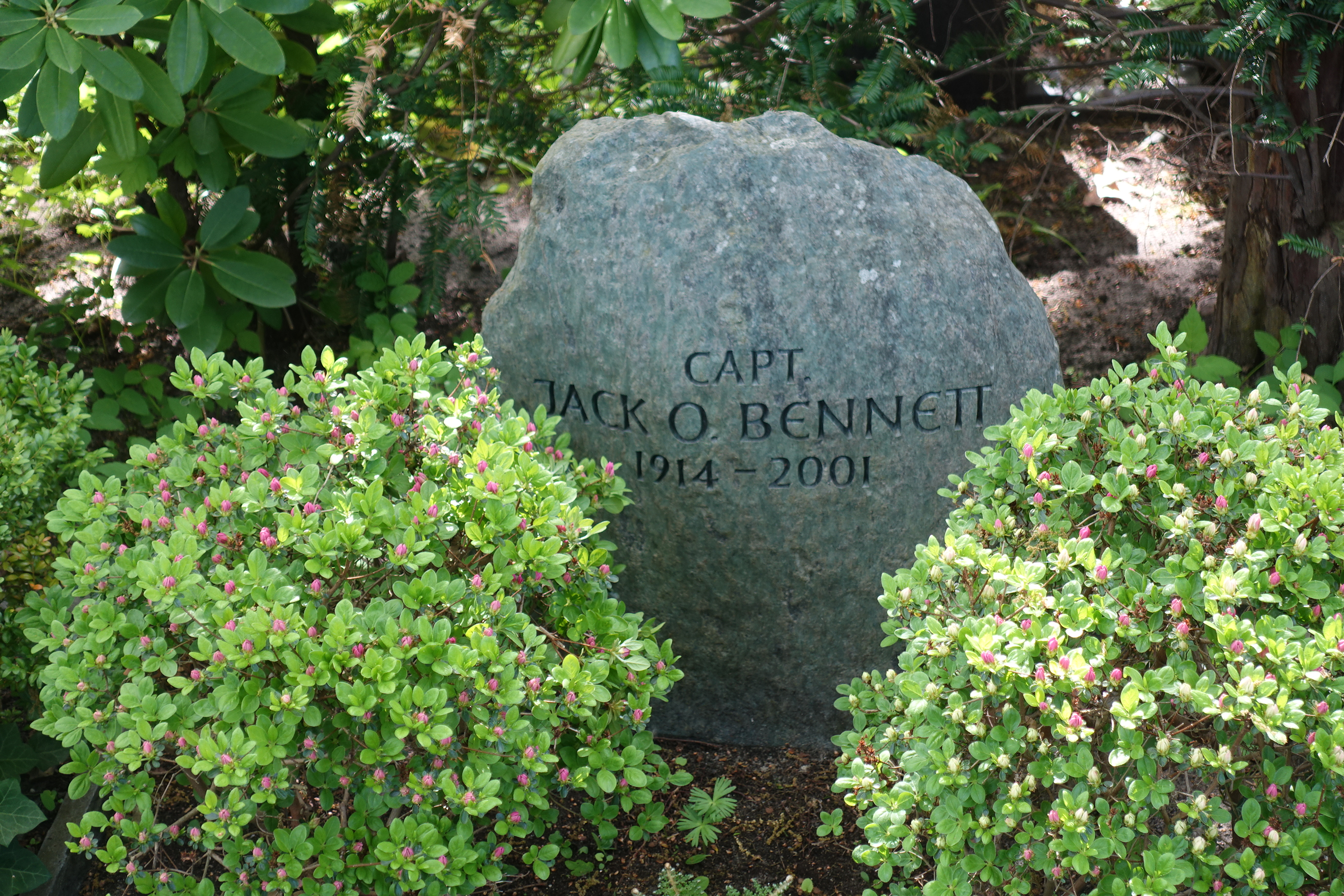 Grab von Jack O. Bennett